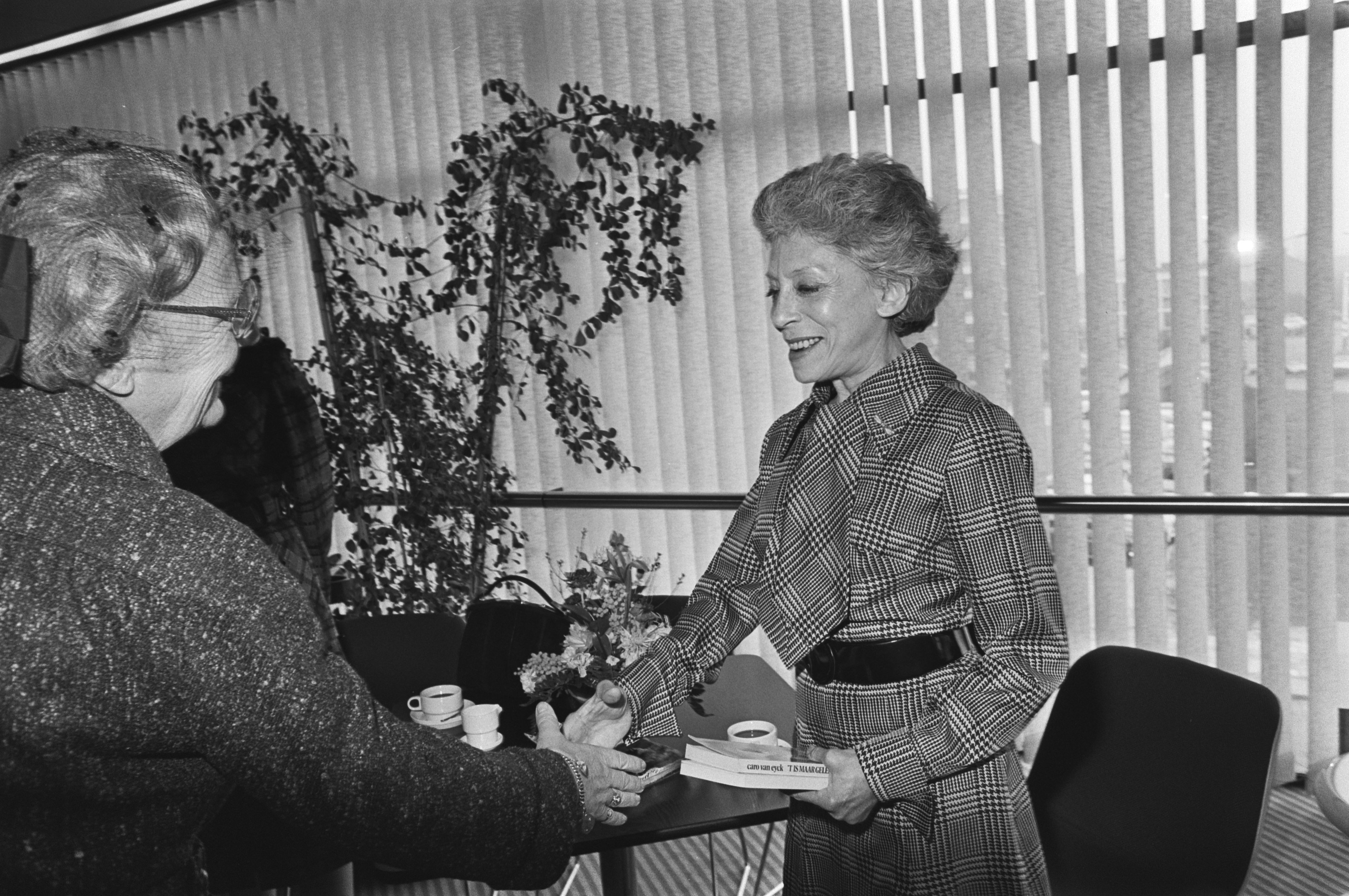 Collectie / Archief : Fotocollectie Anefo Reportage / Serie : Koningin bezoekt "Cultureel Centrum" in Amstelveen Beschrijving : Koningin Juliana met Caro van Eyck Datum : 18 maart 1976 Locatie : Amstelveen, Noord-Holland Trefwoorden : acteurs, koninginnen Persoonsnaam : Eyck, Caro van, Juliana (koningin Nederland) Fotograaf : Fotograaf Onbekend / Anefo, [onbekend] Auteursrechthebbende : Nationaal Archief Materiaalsoort : Negatief (zwart/wit) Nummer archiefinventaris : bekijk toegang 2.24.01.05 Bestanddeelnummer : 928-4722